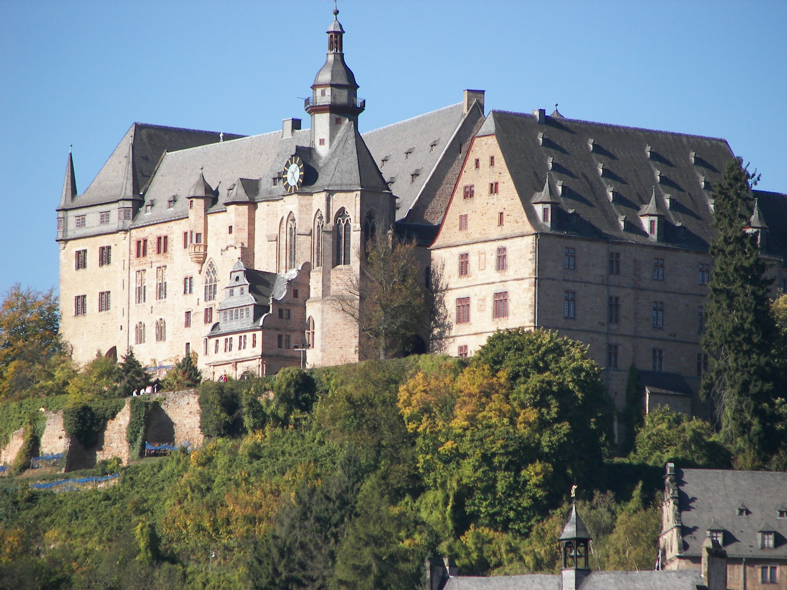 Marburger Schloss: Übersicht